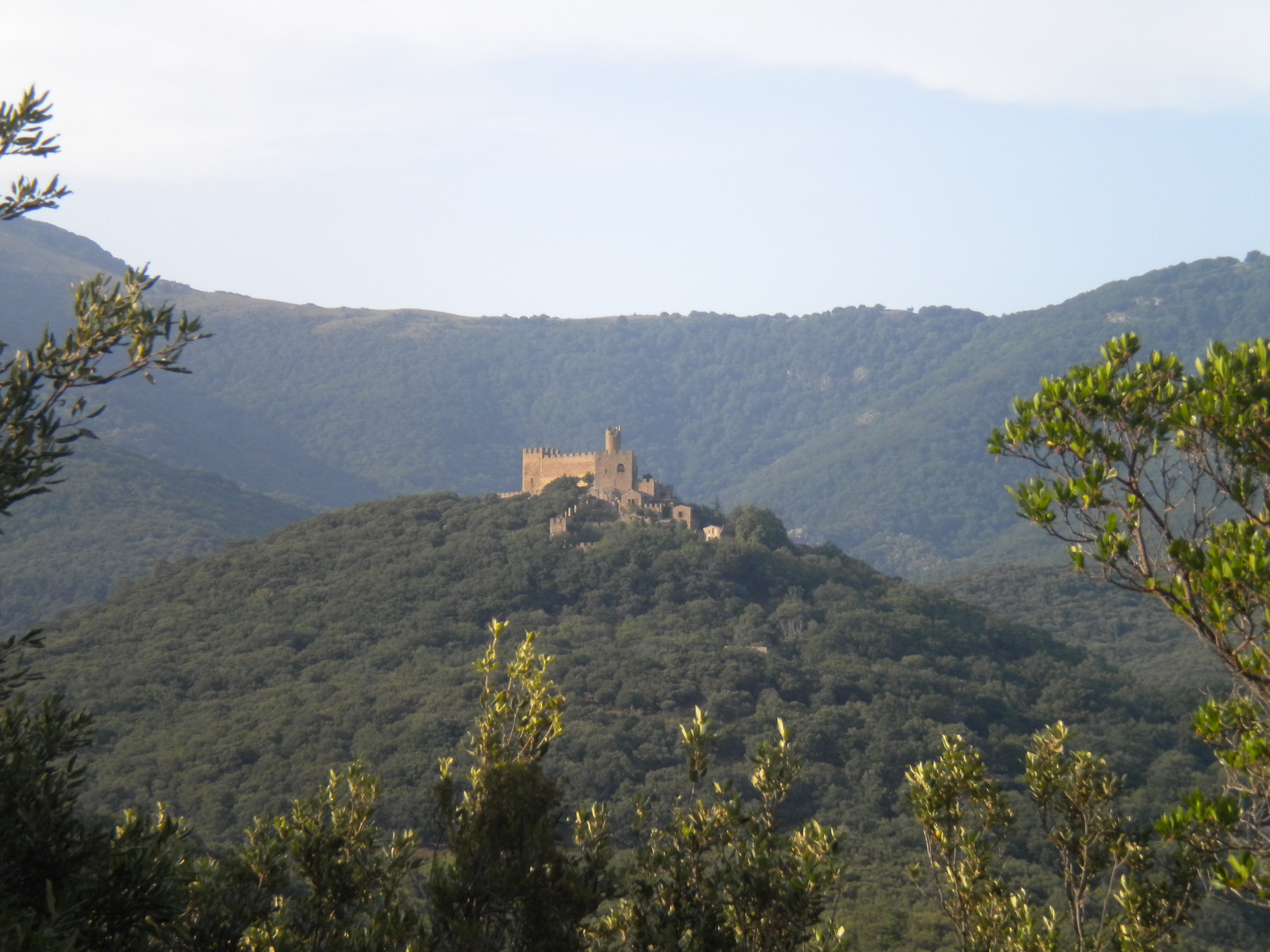 Panoràmica de l'entorn del Castell de Requesens, al municipi altempordanès de la Jonquera.